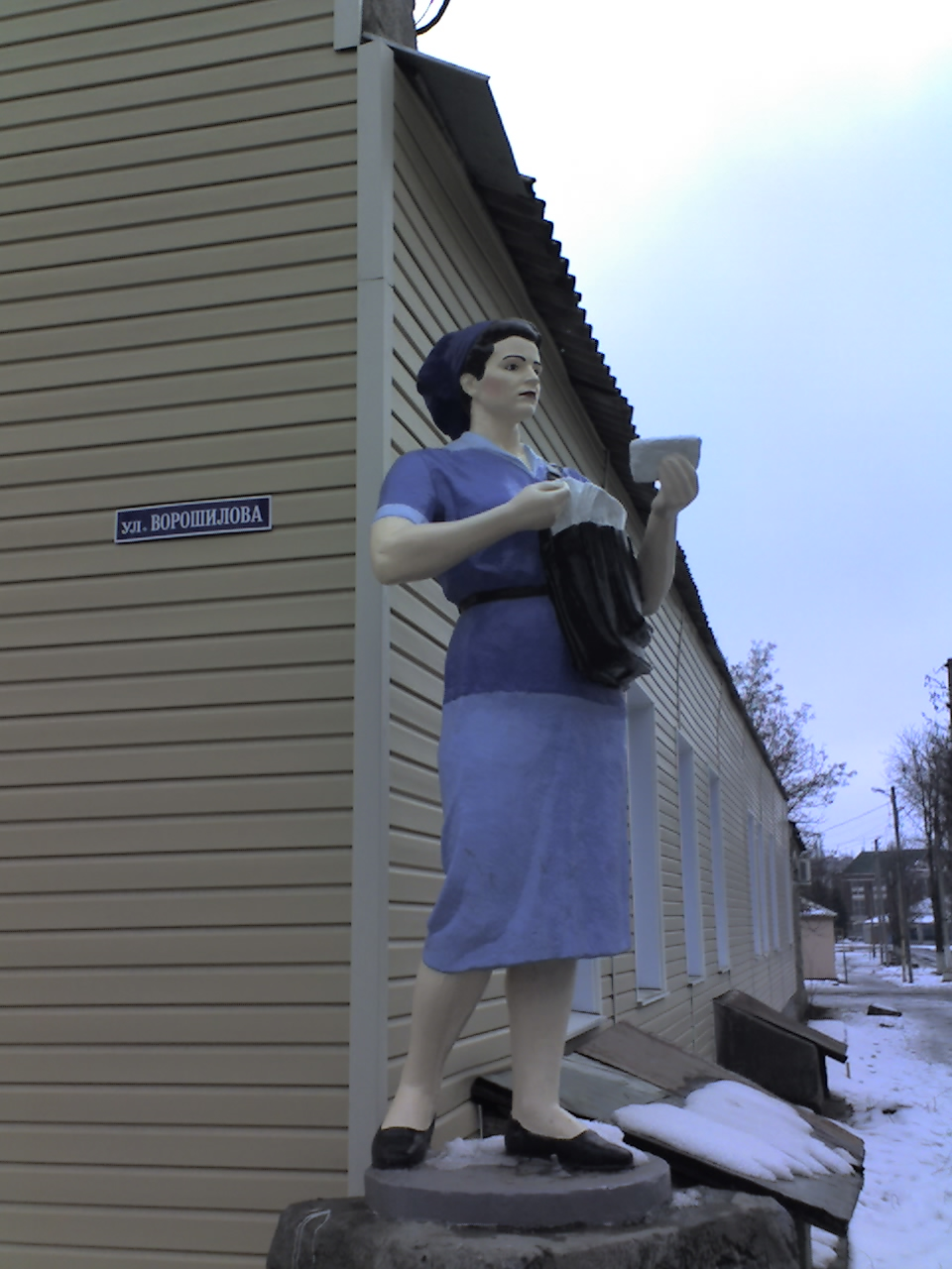 Скульптура связана с событиями Великой Отечественной войны. Это памятник простому почтальону, который расположен рядом с центральным почтамтом. Он был установлен после войны, потому что, когда он шла, значение почты было колоссальным.